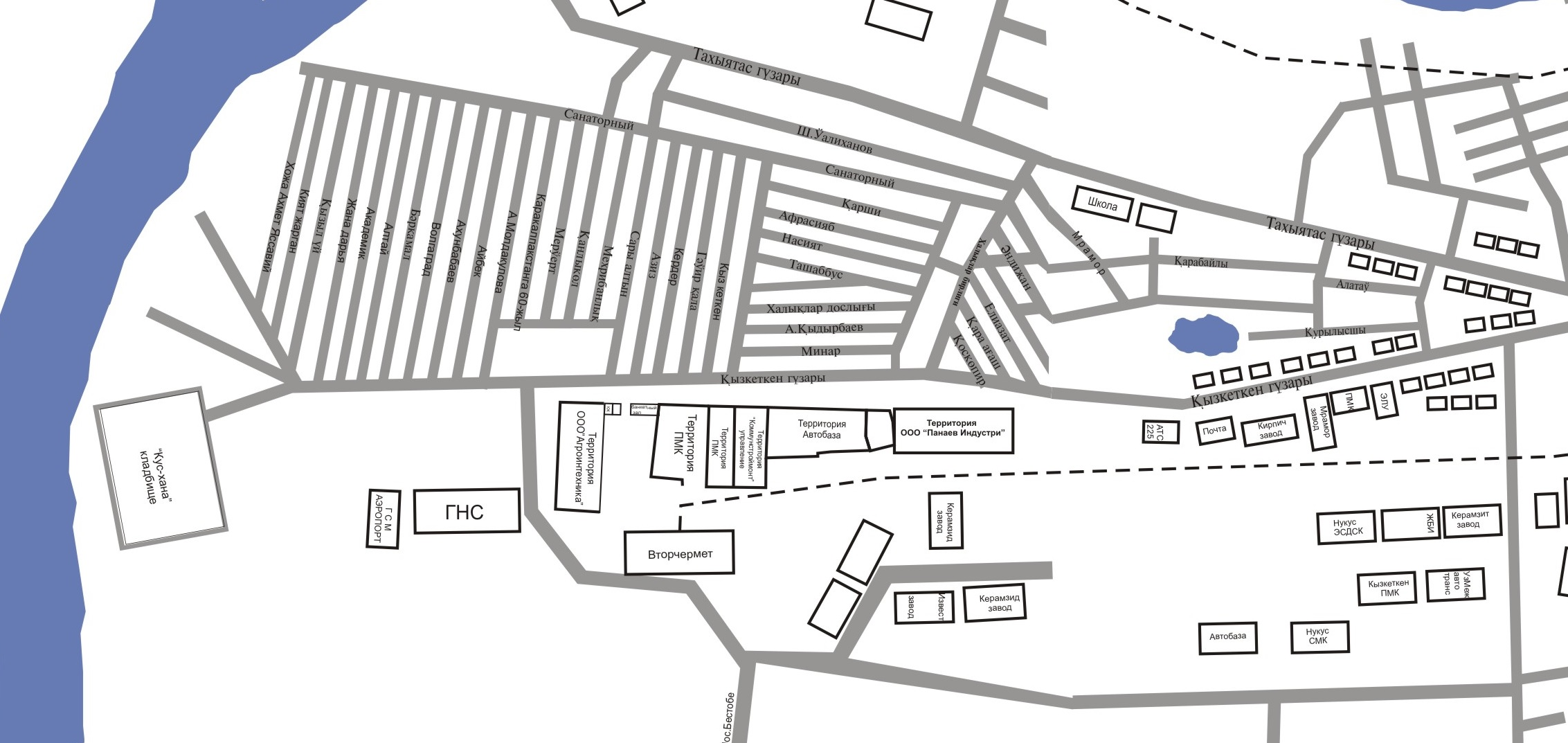 Кызкеткен карта